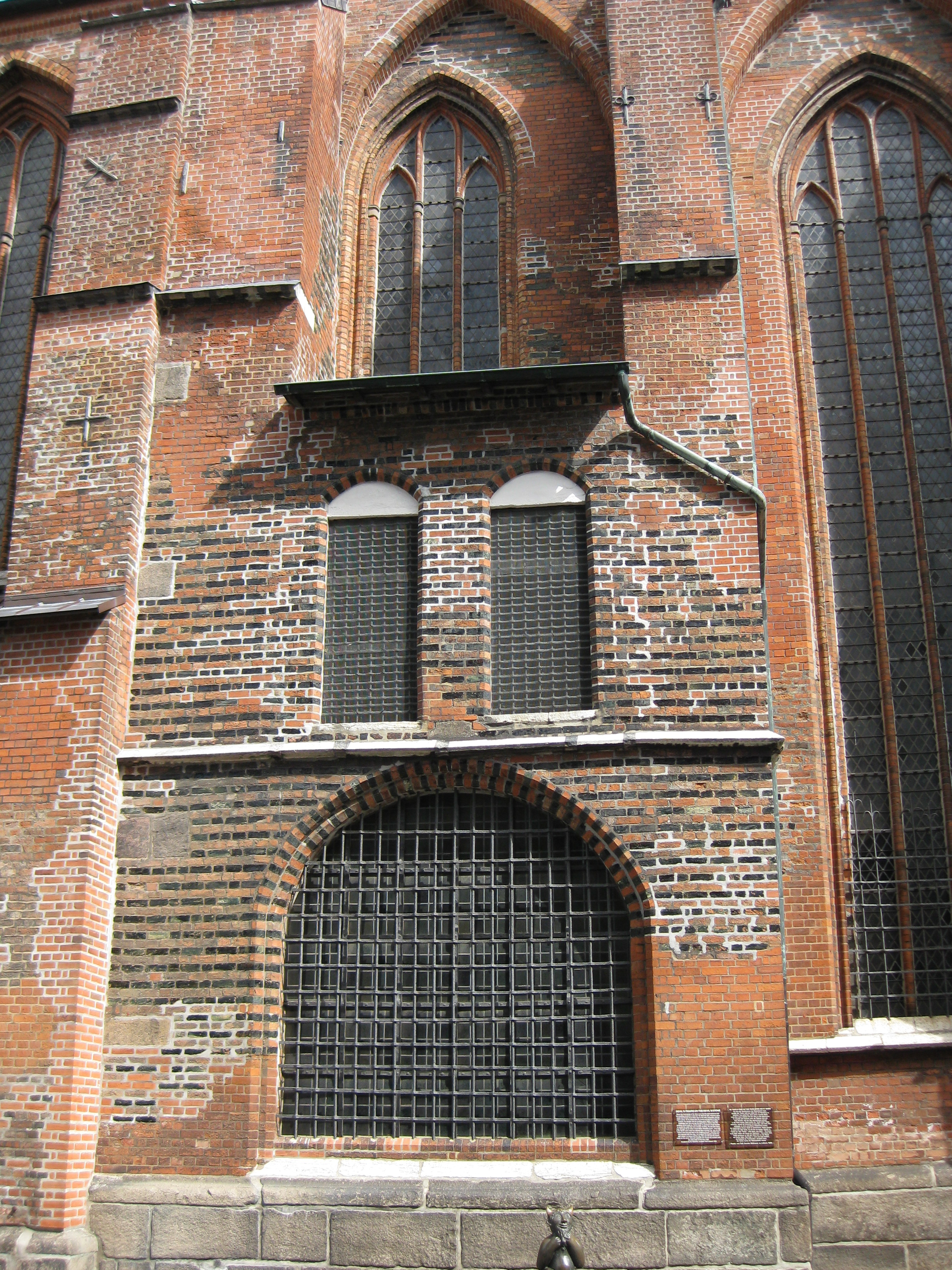 Aussenansicht der Trese (Schatzkammer und Urkundenarchiv) des Lübecker Rates in der Lübecker Marienkirche. Erkennbar die starken Eisengitter im Erdgeschoss und Obergeschoss.